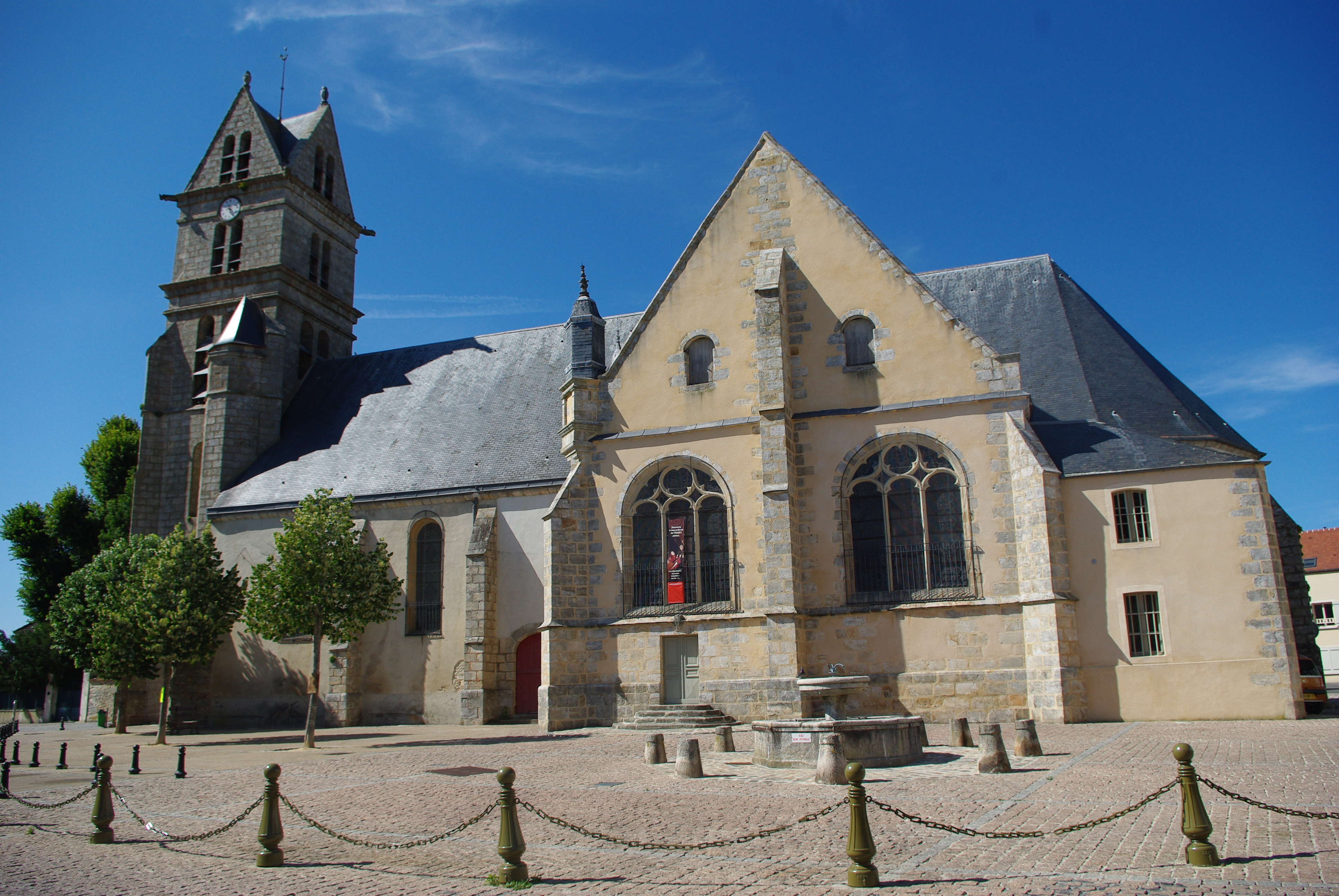 Église Saint-Martin de Fontenay-Trésigny, XVIe